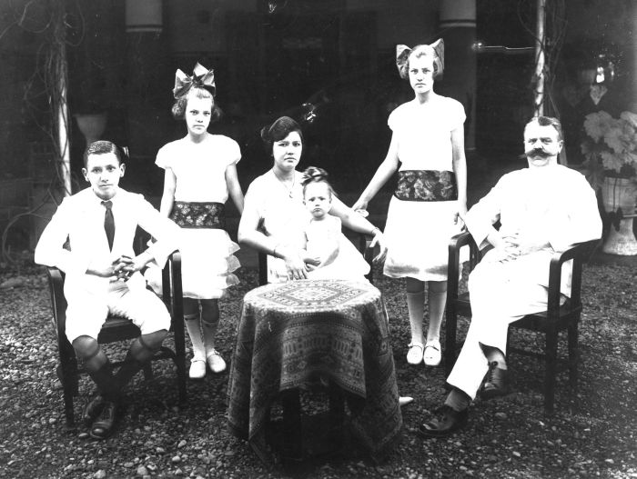 Foto. Foto bersama suatu keluarga Eropa: ayah Eropa dan ibu Indo